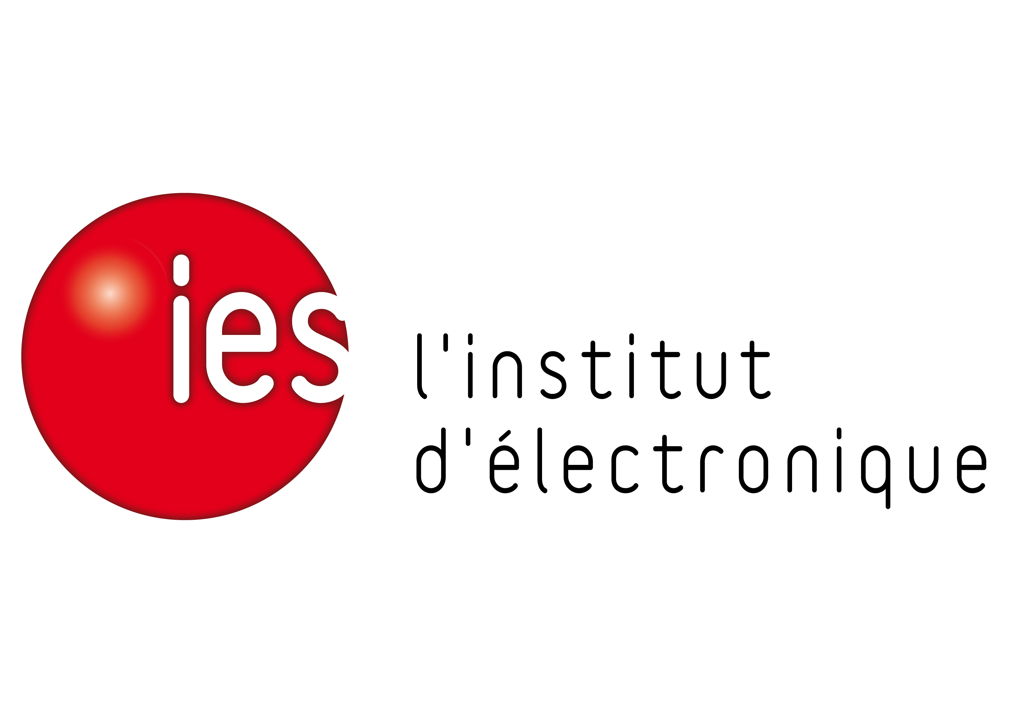 Logo IES